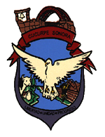 Escudo del municipio sonorense.